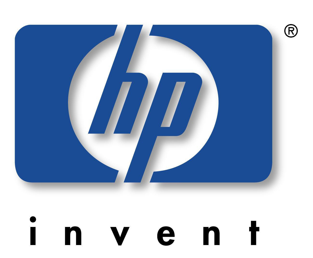 Loho HP invent